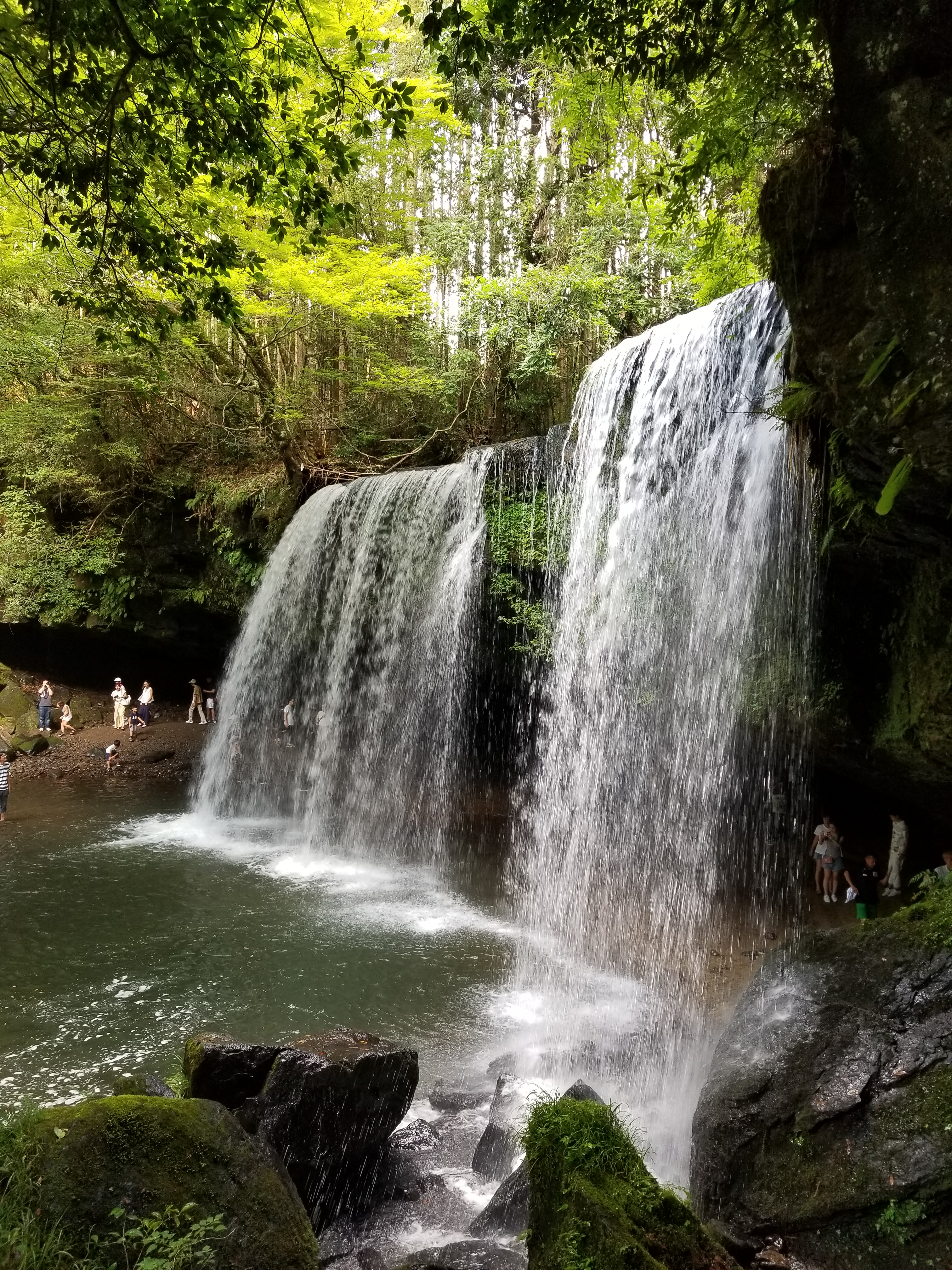 鍋ケ滝(熊本県小国町）